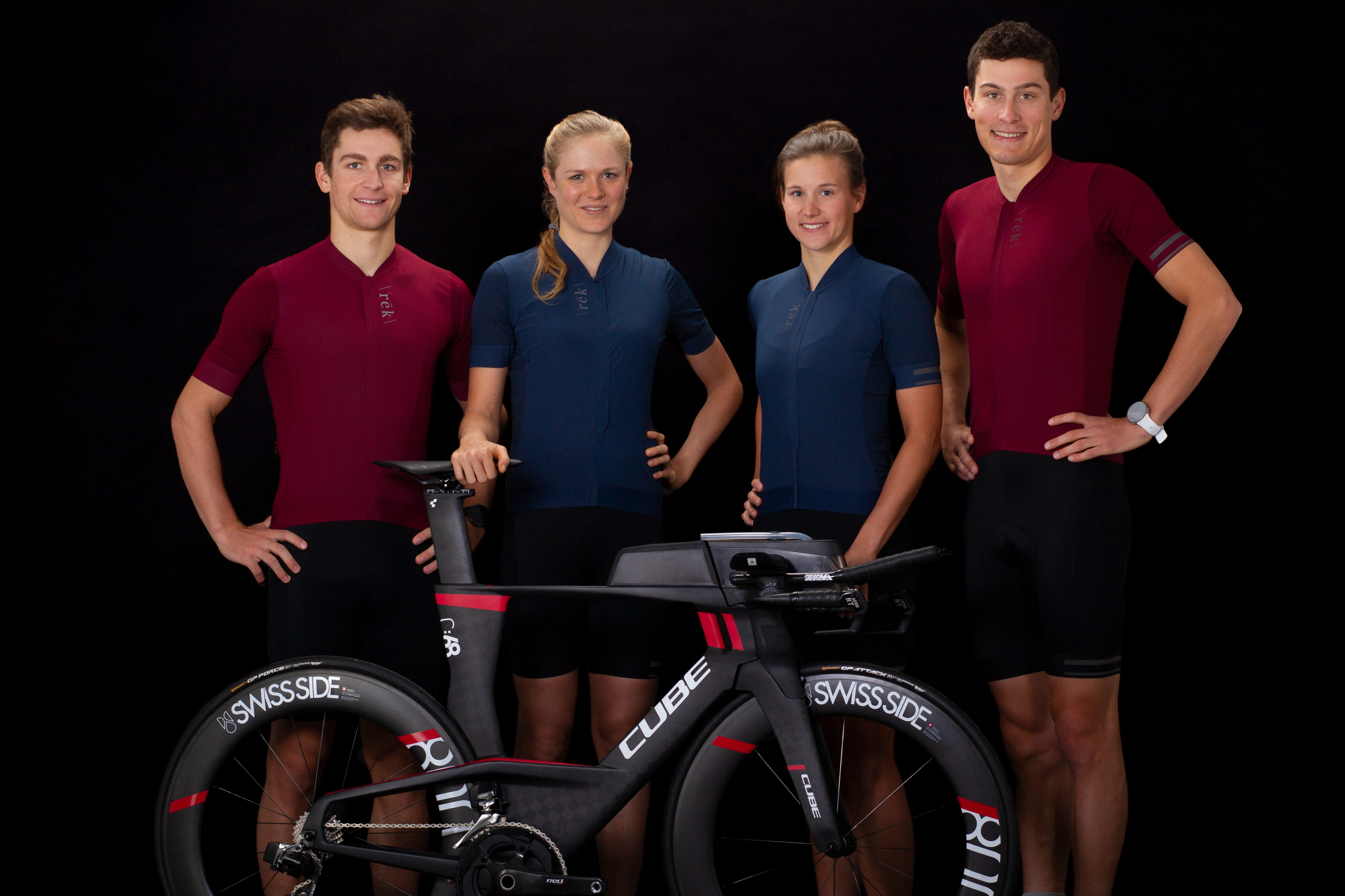 Das Team Erdinger Alkoholfrei mit dem Aerium C:68